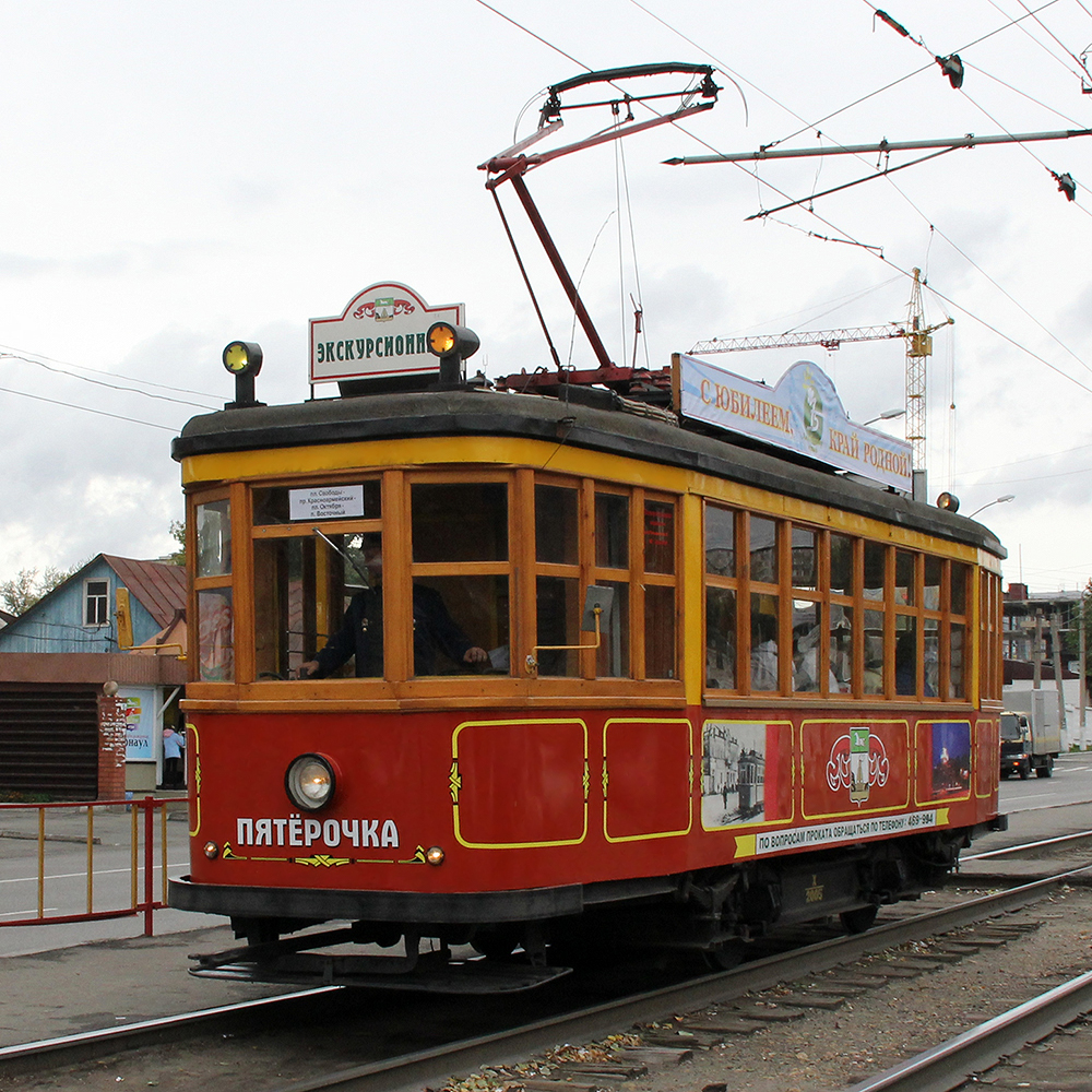 Трамвайный вагон серии Х, находящийся в г. Барнауле. Работает на линии в качестве музейного вагона в день 75-летия Алтайского края.